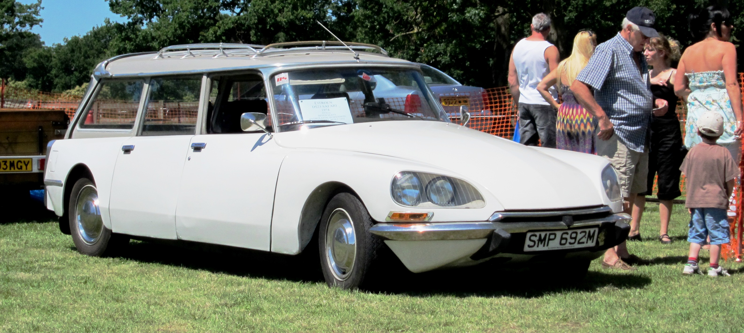 Citroen DS23 Break in Essex. This is how the car (branded in England as the Citroen DS Safari) looked shortly before the model was replaced with the Citroën CX